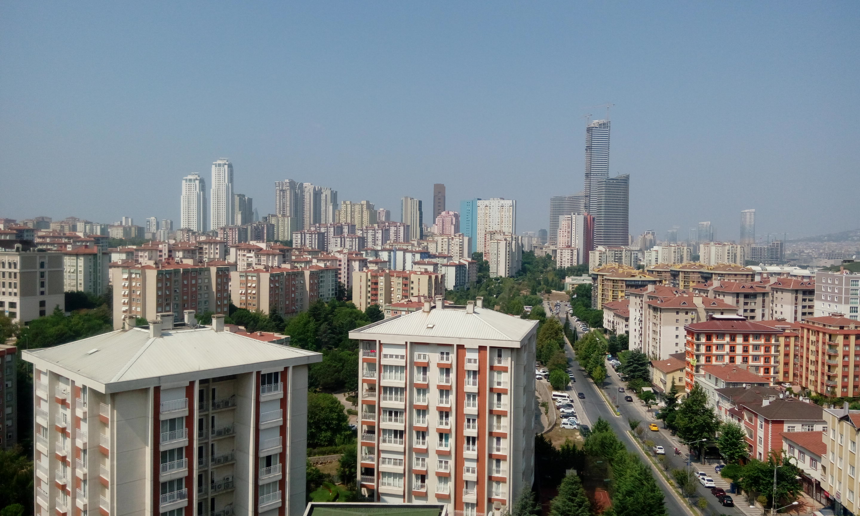 Batı Ataşehir'in görünümü